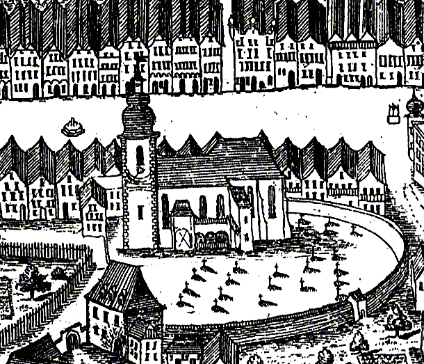 Ansicht von Schwanenstadt. Kupferstich aus Georg Matthäus Vischers Topographia Austriae superioris modernae (erschienen 1674)